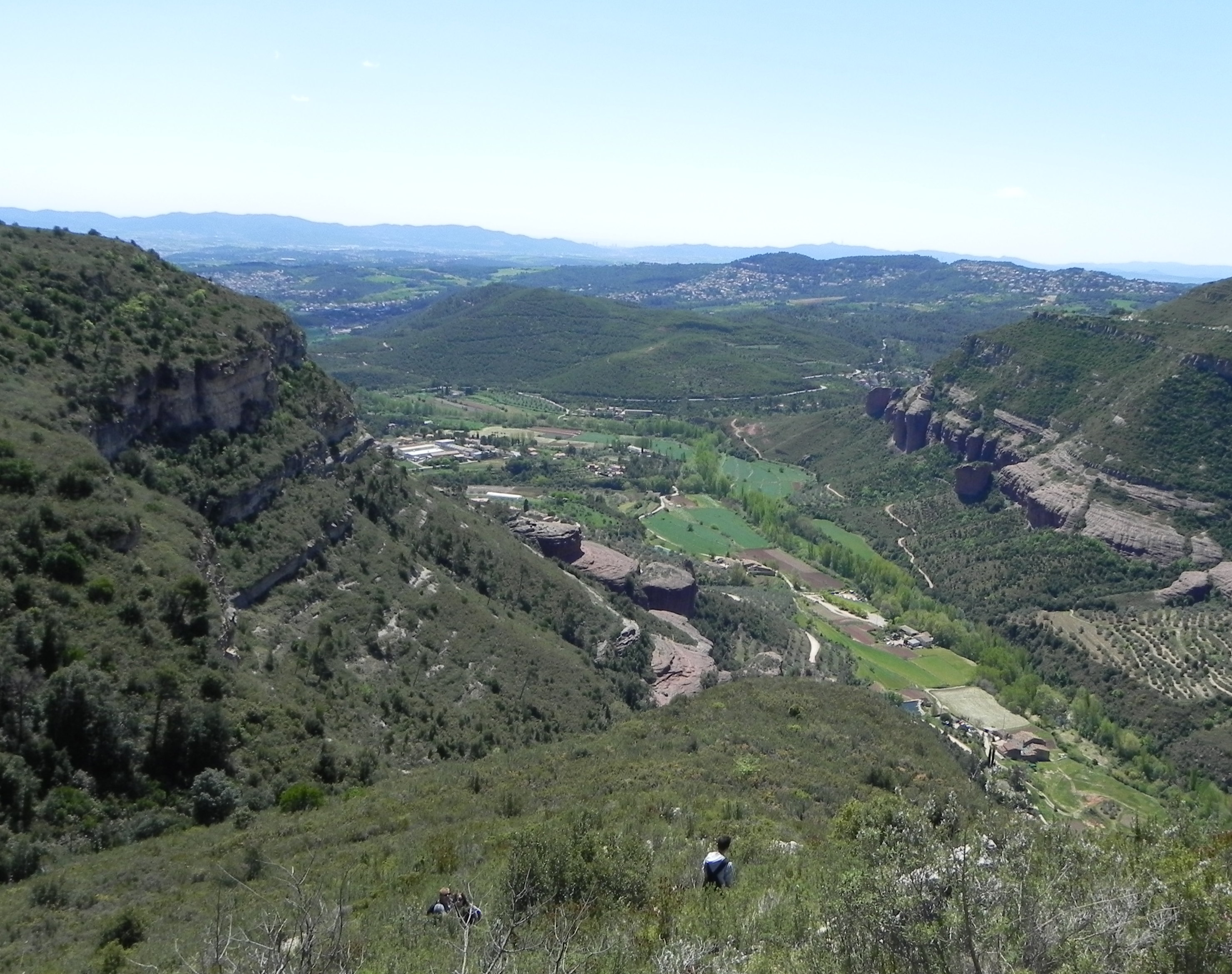 La vall del Tenes This is a photography of a Special Area of Conservation in Spain with the ID: ES5110008. Natura2000 entry, EEA entry